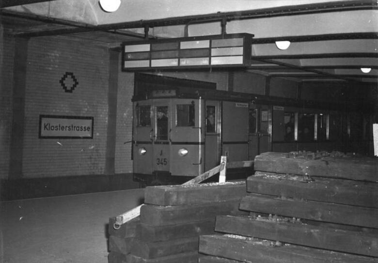 Illus-Martin Kno-Ho. 9.12.1951 Eine neue U-Bahnlinie in Berlin. In der Nähe des U-Bahnhofes Klosterstrasse in der Littenstrasse in Berlin wird eine neue U-Bahn-Verbindungstrecke gebaut. UBz: Auf dem Bahnsteig des U-Bahnhofes Klosterstrasse liegen Schwellen für die neue Strecke.